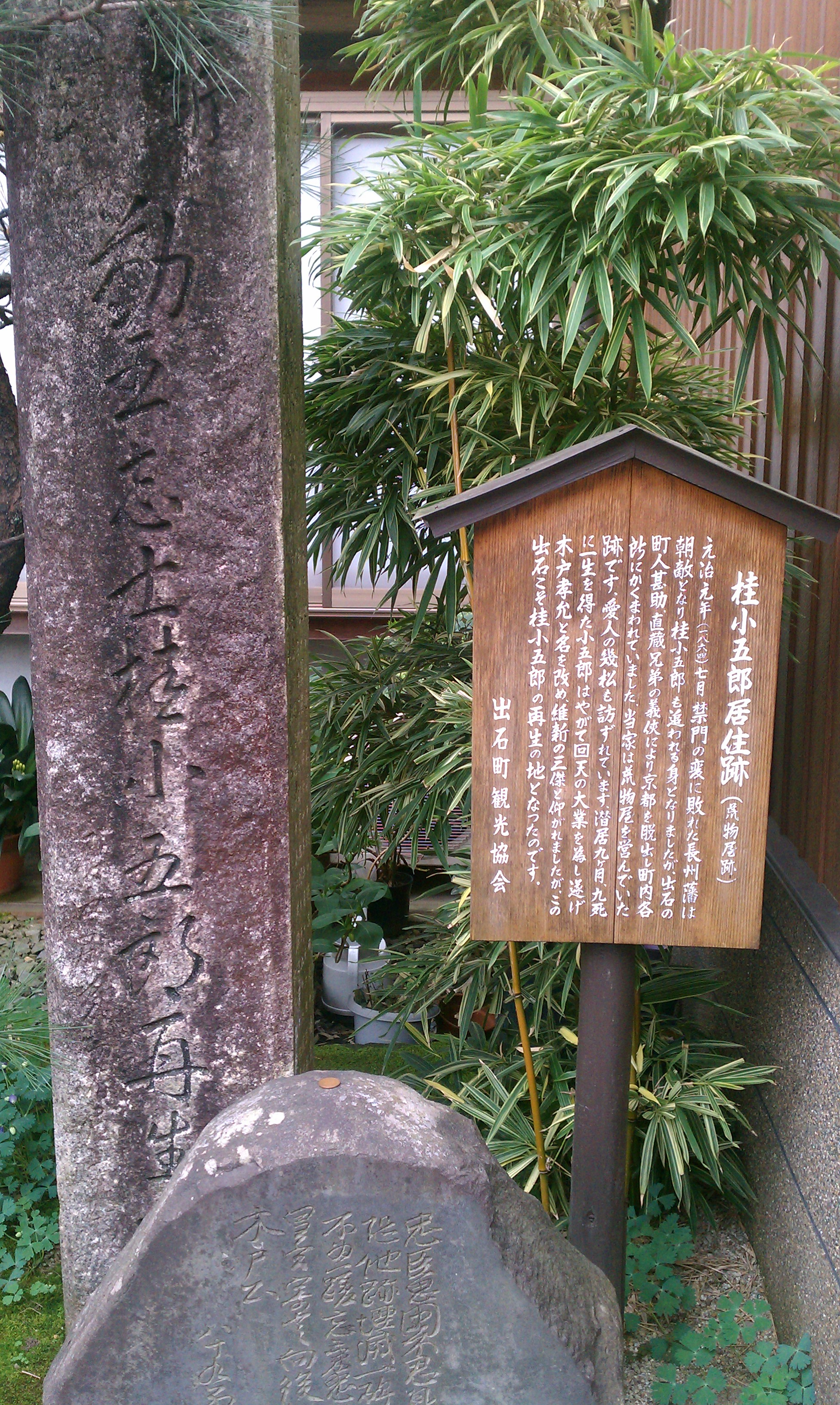 兵庫県豊岡市出石町にある桂小五郎邸あと